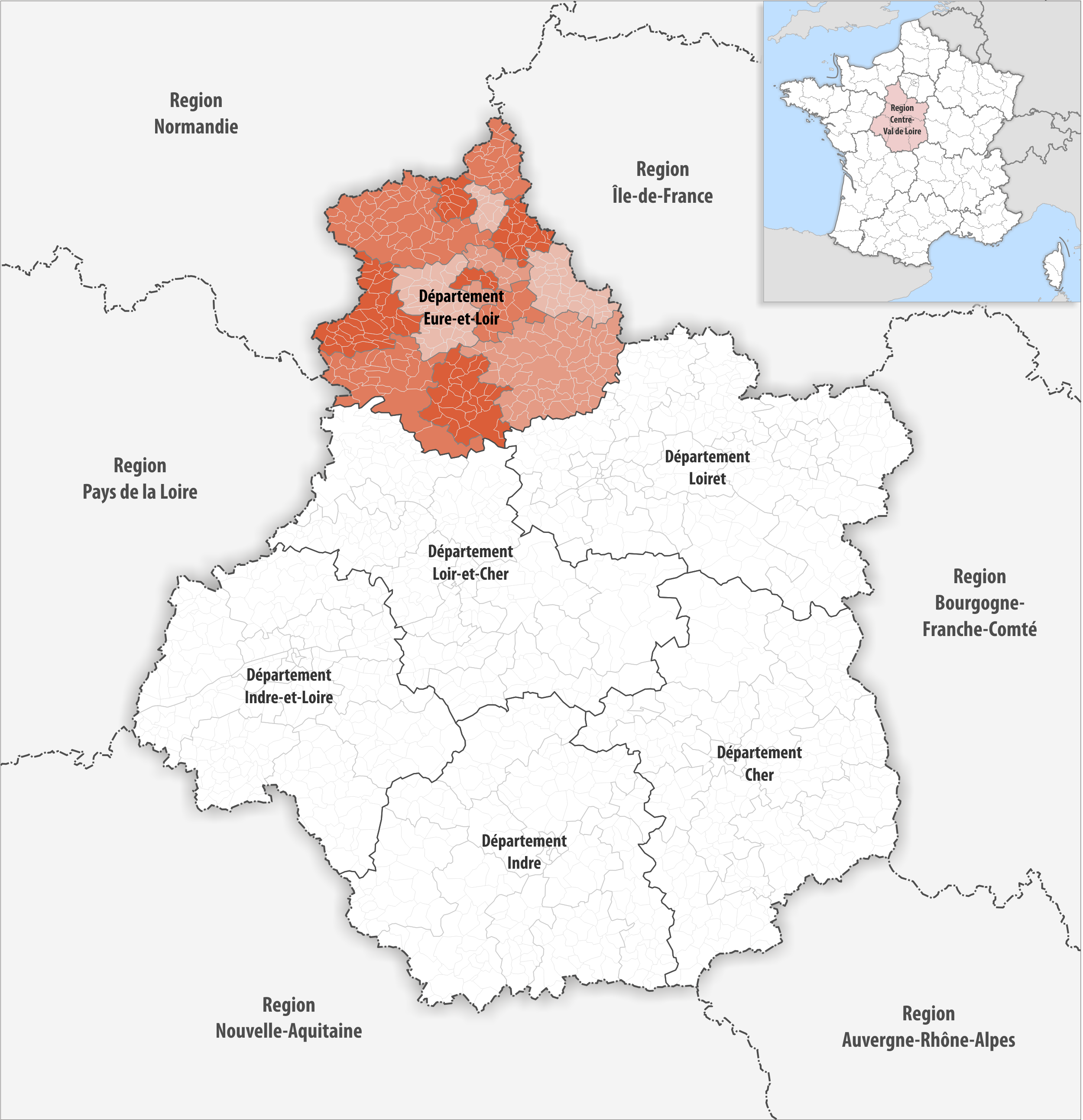 Lage des Departements Eure-et-Loir